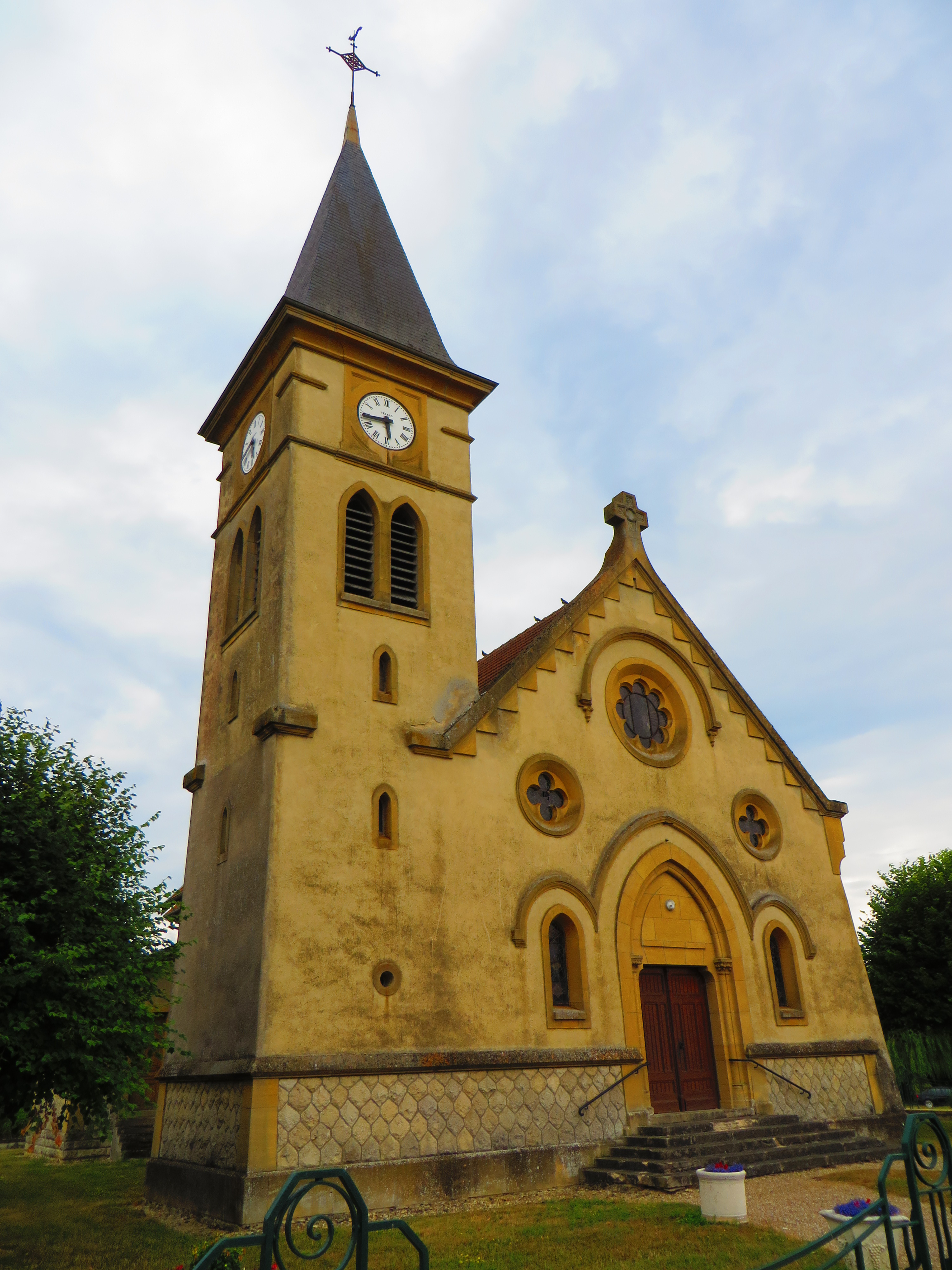 Boureuilles Église Saint-Martin